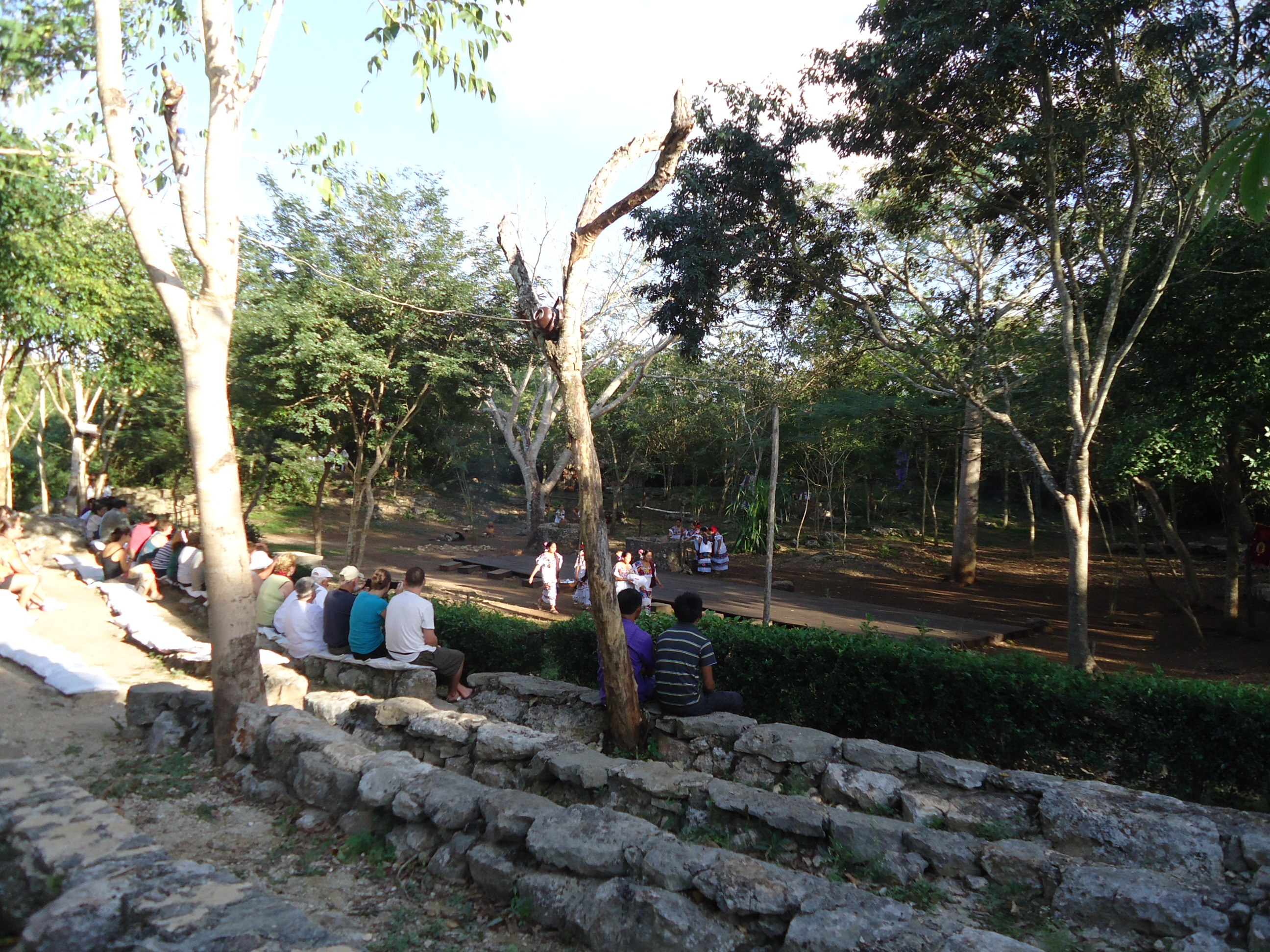 Teatro Xocen